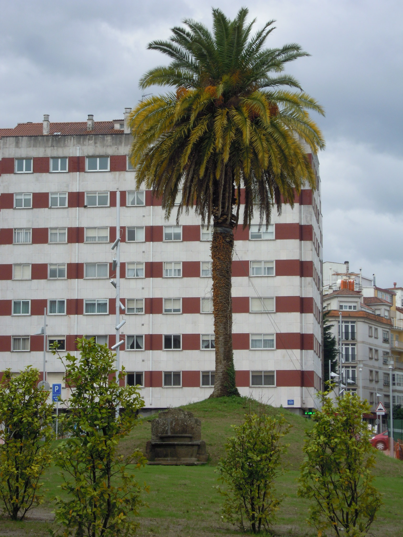 Fonte da Eiriña en Pontevedra